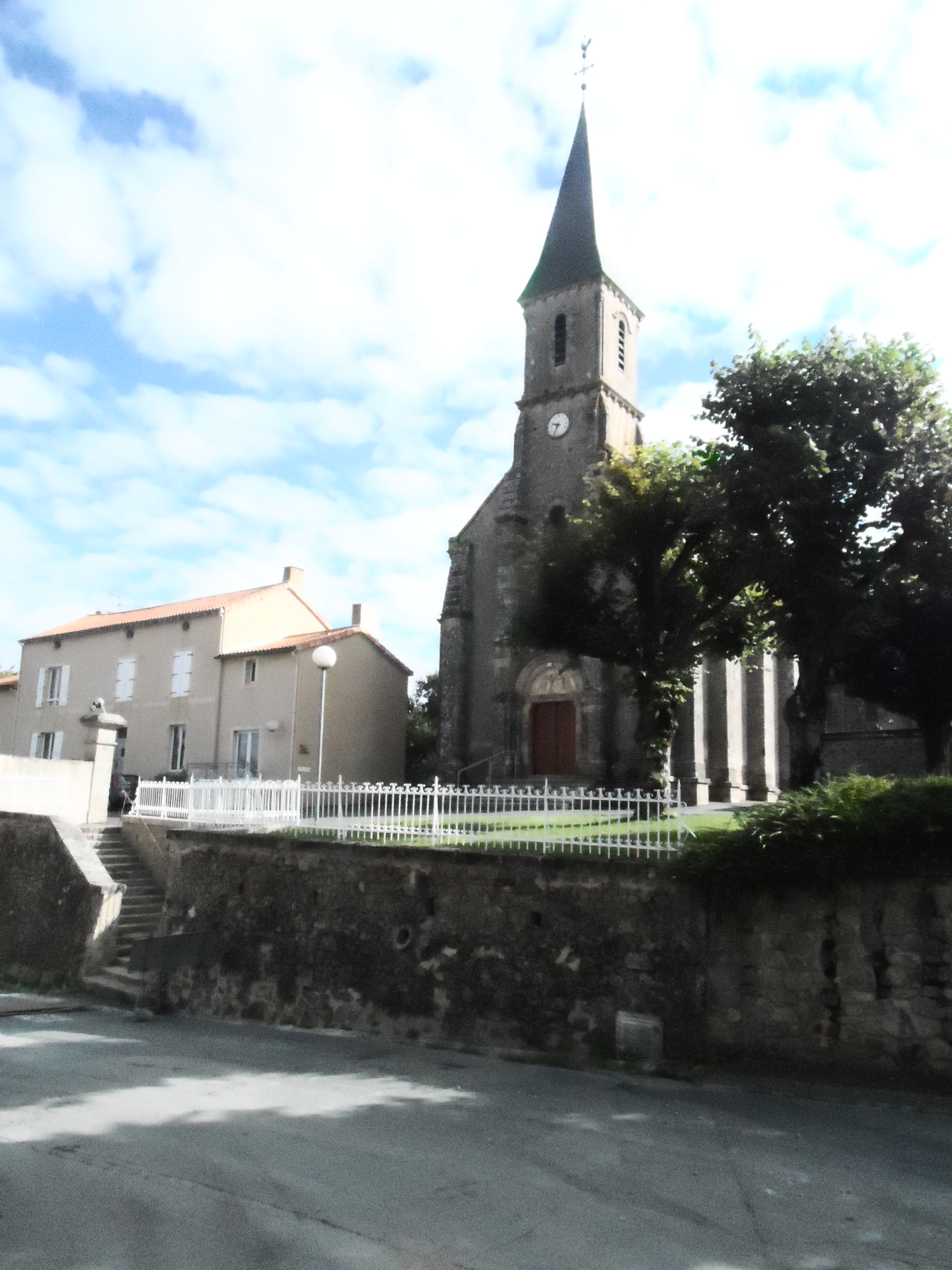 Eglise Sainte-Radegonde